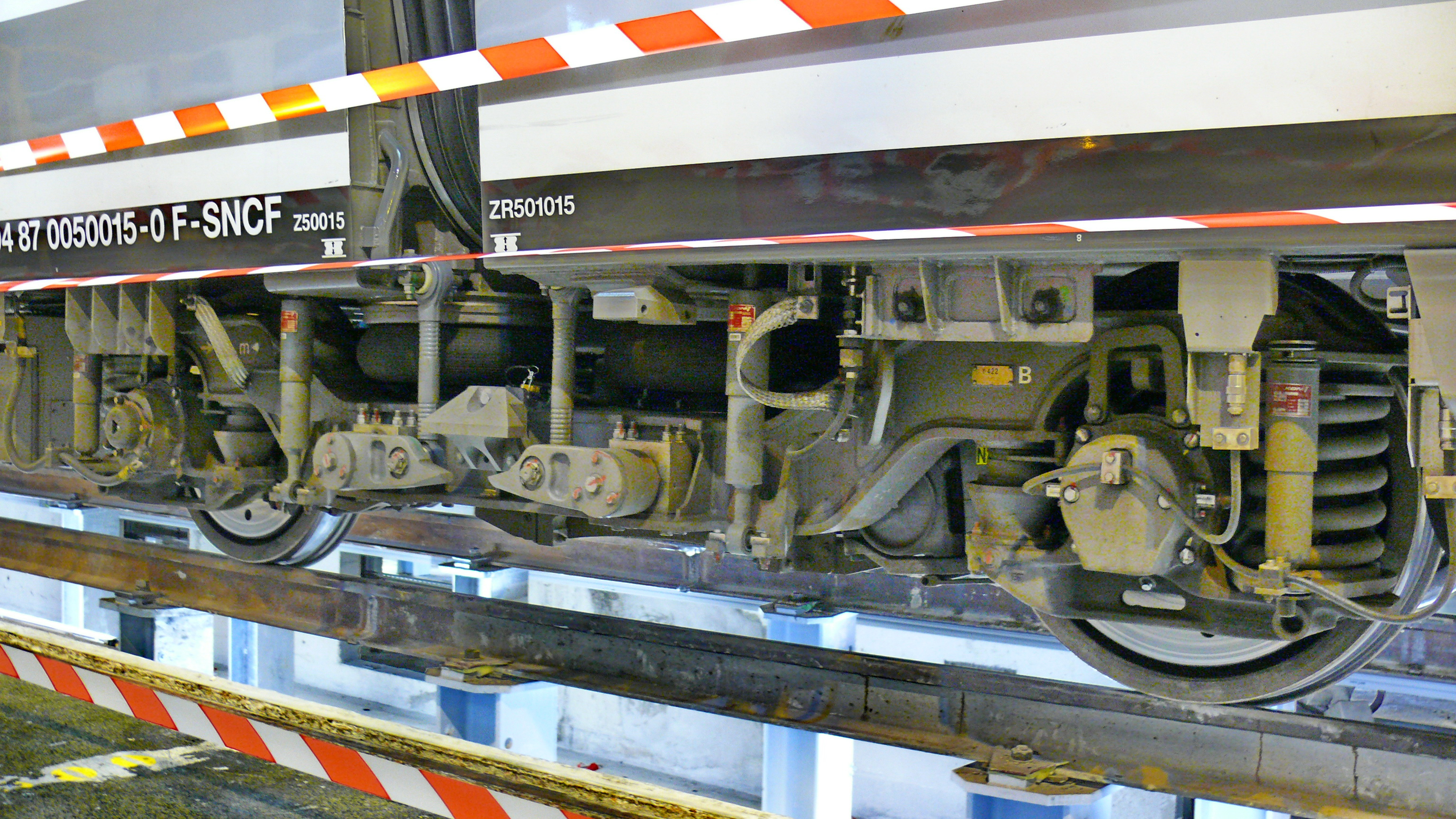 Bogie de la rame Z 50015, photographié lors de portes ouvertes du dépôt des Joncherolles